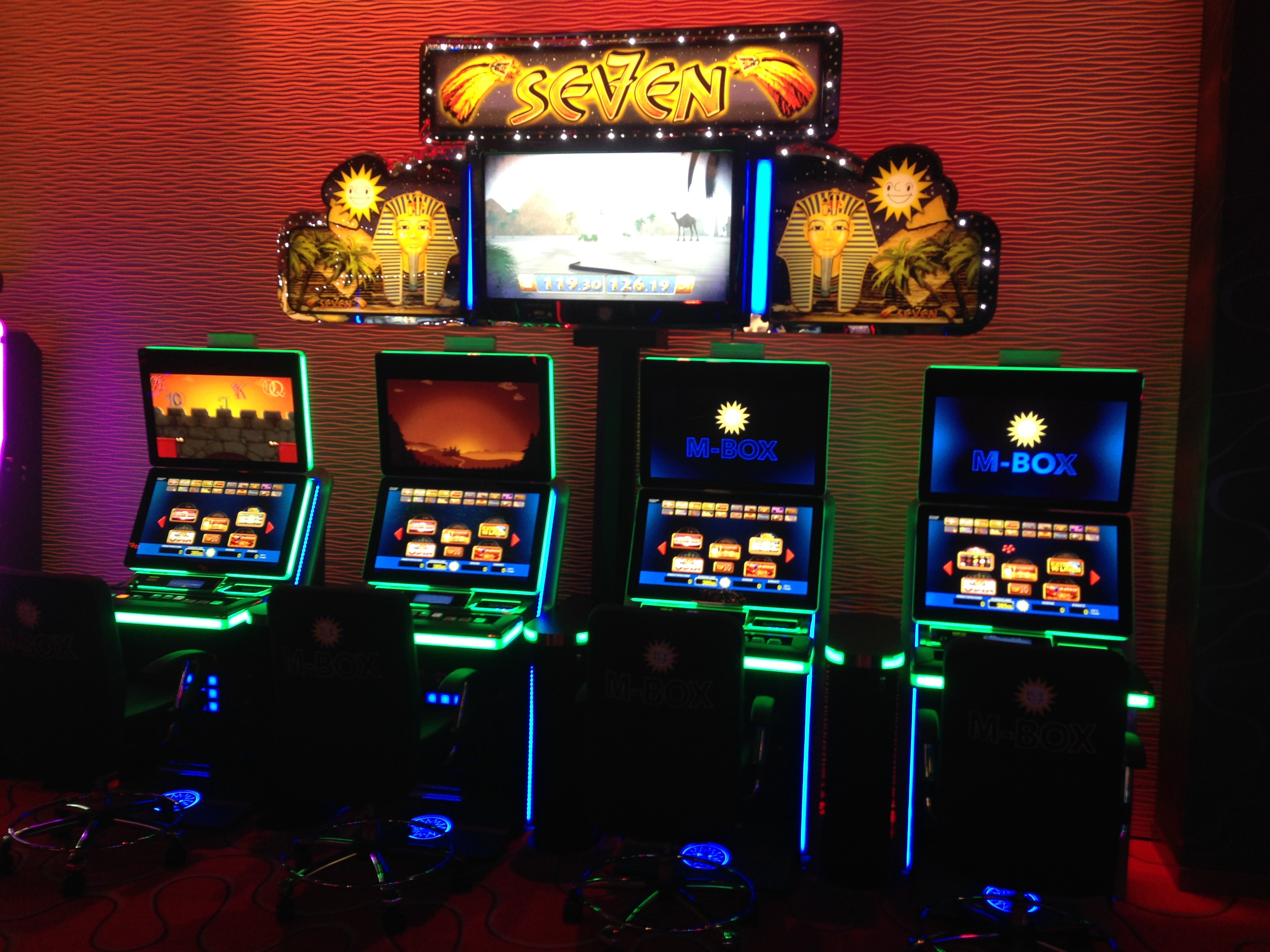 Spielbank Magdeburg: Slotmachines vom Typ "M-Box" mit Jackpot "Seven"